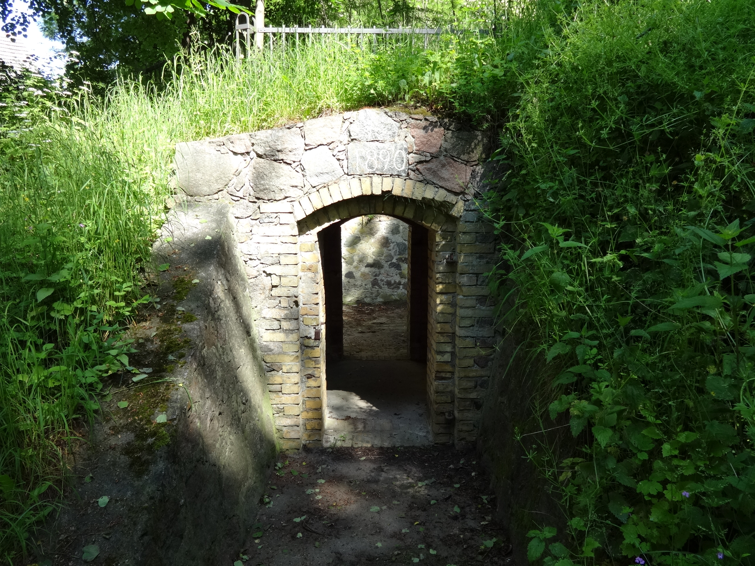 Schlosspark in Buckow (Märkische Schweiz): Im 17. Jahrhundert entstand neben dem Schloss ein Garten im Stil des Barock. Er bestand aus einem Lustgarten mit Blumenbeeten sowie einem Nutzgarten für die Schlossküche. Beide sind heute nicht mehr erhalten. Im 18. Jahrhundert als englischer Landschaftsgarten umgeplant erhielt er seine heutige Gestalt Ende des 19. Jahrhunderts. Er wird unter anderem als Veranstaltungsort für Sommerkonzerte und die Buckower Rosentage genutzt. Am nördlichen Ende erhebt sich der 61 Meter hohe Schlossberg.